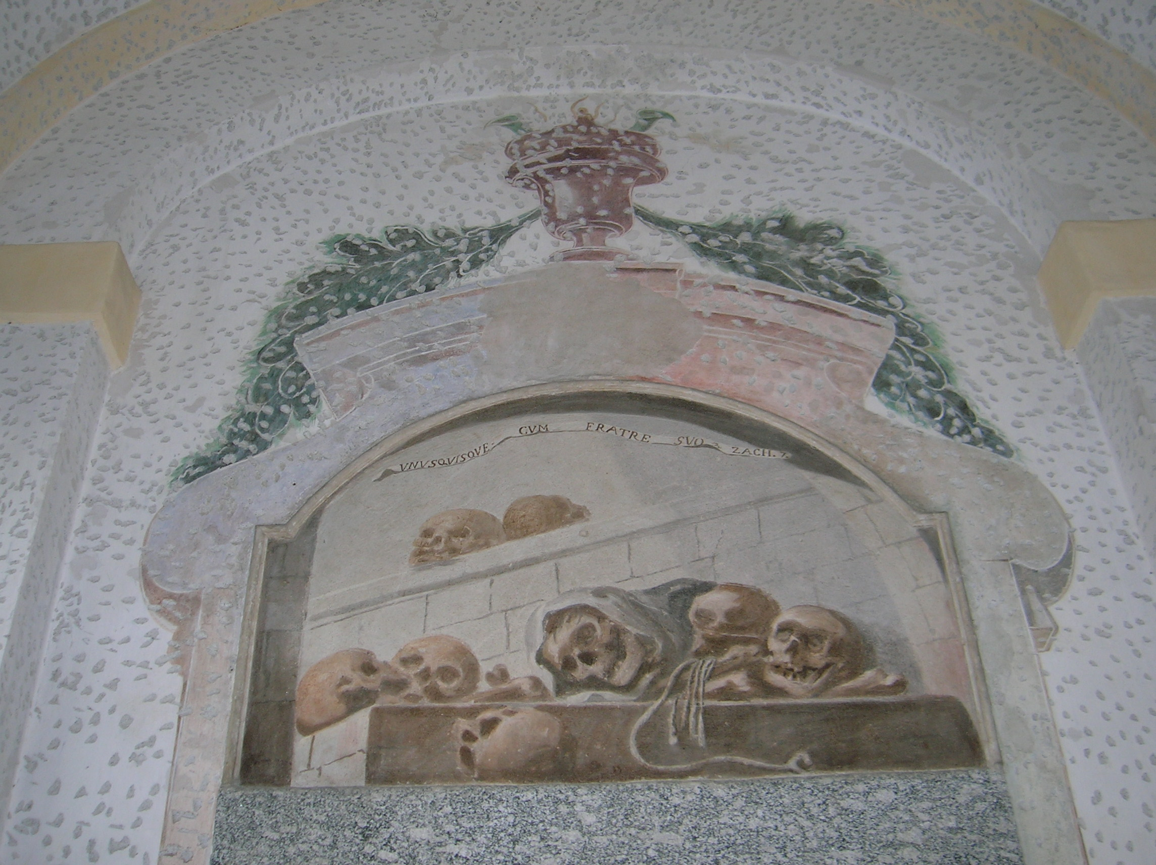 affreschi esterni, sulla sinistra dell'entrata, della chiesa del Santo Crocefisso ad Asso